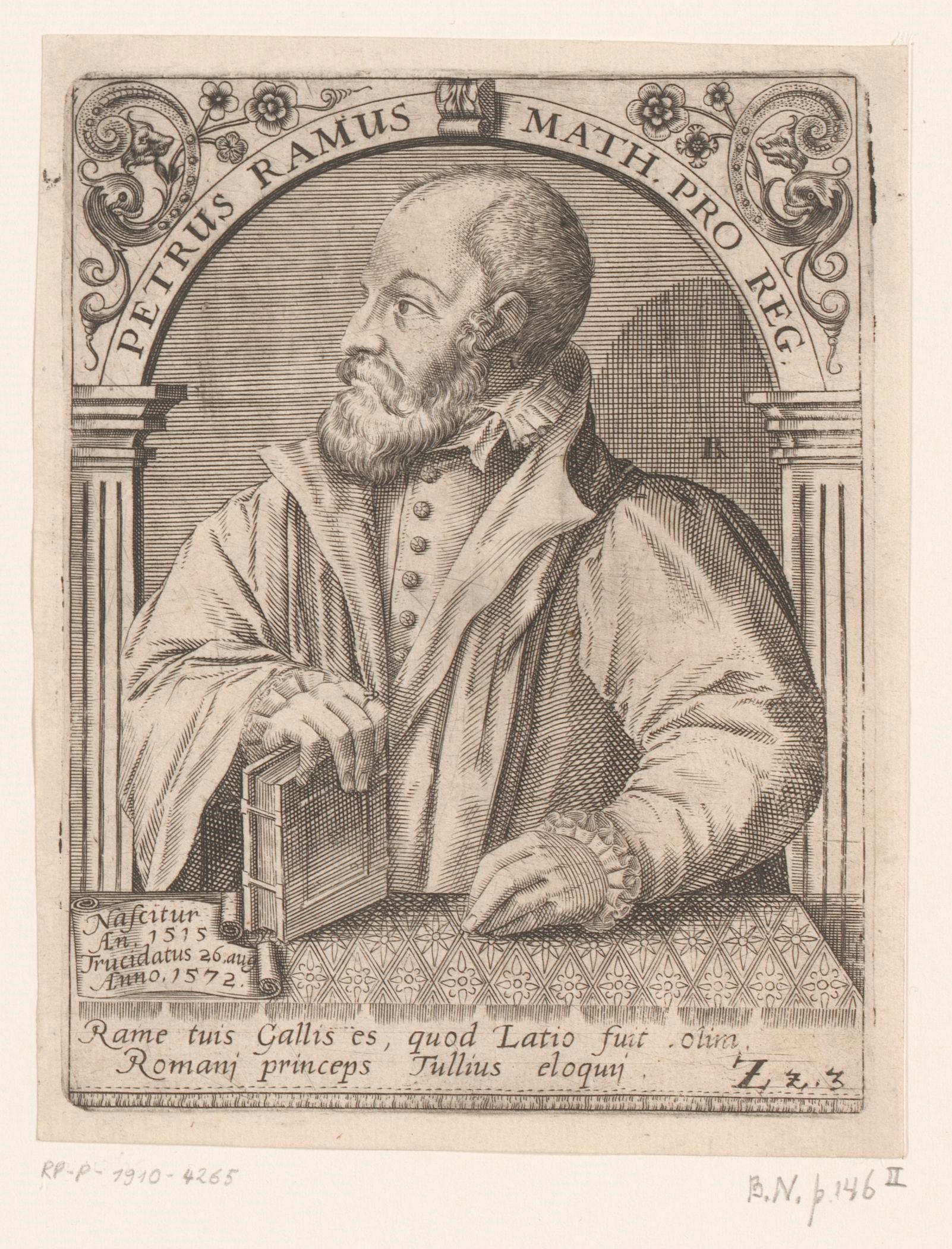 IdentificatieTitel(s): Portret van Pierre de La RaméePetrus Ramus math. pro reg. (titel op object)Serie portretten van vijftiende- en zestiende-eeuwse geleerden (serietitel)Objecttype: prent Objectnummer: RP-P-1910-4265Catalogusreferentie: LeBlanc 159Opschriften / Merken: verzamelaarsmerk, verso, gestempeld: Lugt 2228Omschrijving: Rechtsonder genummerd Zz.3.VervaardigingVervaardiger: prentmaker: Robert Boissard (vermeld op object)prentmaker: Johann Theodor de Bry (verworpen toeschrijving)Plaats vervaardiging: FrankrijkDatering: 1597 - 1599Materiaal: papier Techniek: graveren (drukprocedé)Afmetingen: plaatrand: h 139 mm × b 108 mmToelichtingMogelijk prent uit: Boissard, Jean-Jacques; Bry, Theodoor de; e.a. Bibliotheca sive thesaurus virtutis et gloriae in quo continentur illustrium eruditione et doctrina virorum effigies et vitae (...). Frankfurt: Guilielmi Fitzeri, 1628.OnderwerpWat: historical personsbookswimming mammals: dolphin - FF - fabulous animals (sometimes wrongly called 'grotesques'); 'Mostri' (Ripa)Wie: Petrus RamusVerwerving en rechtenVerwerving: aankoop 1905Copyright: Publiek domein